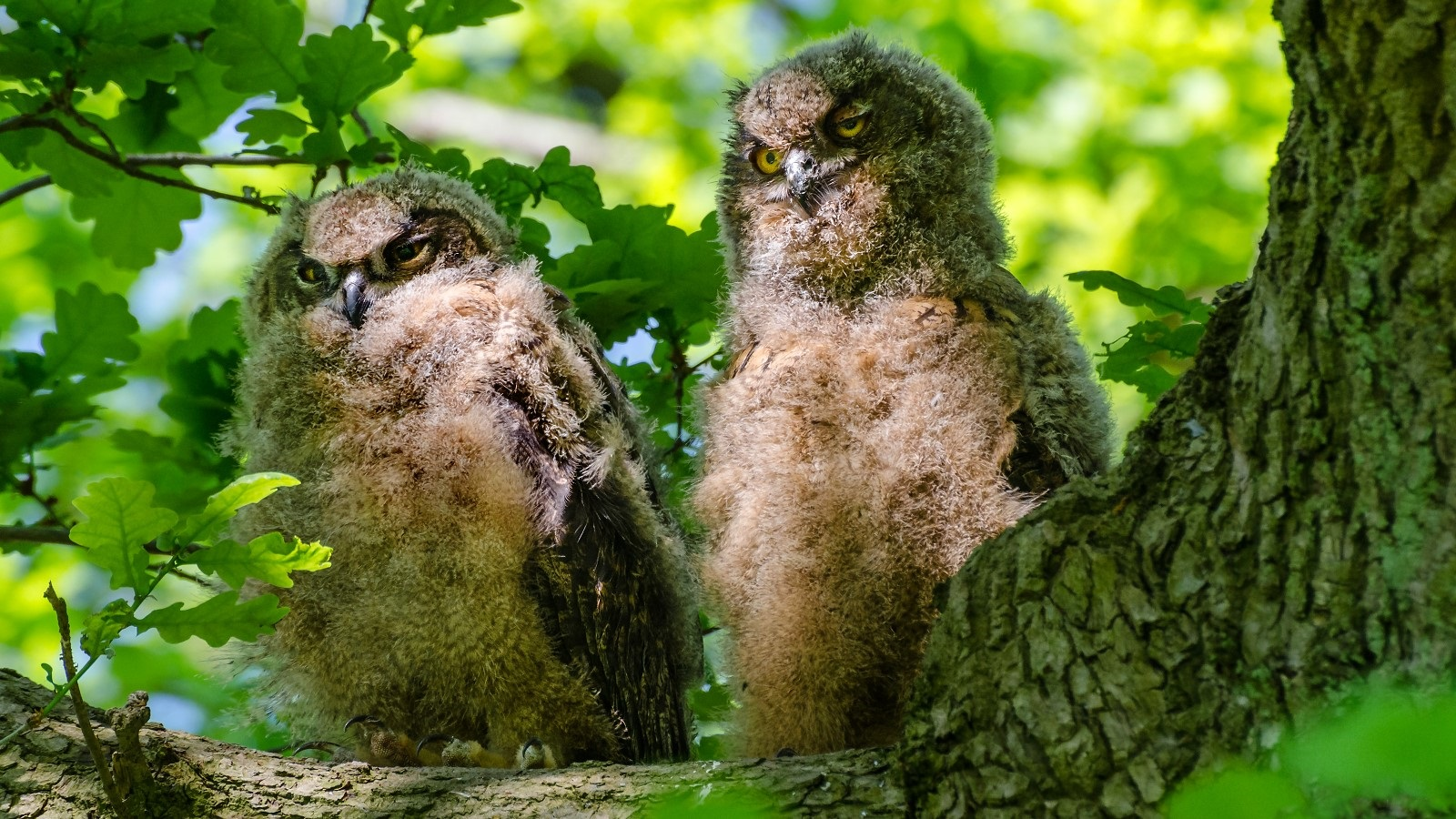 Naturschutzgebiet Duvenstedter Brook in Hamburg: Junguhus (Bubo bubo).